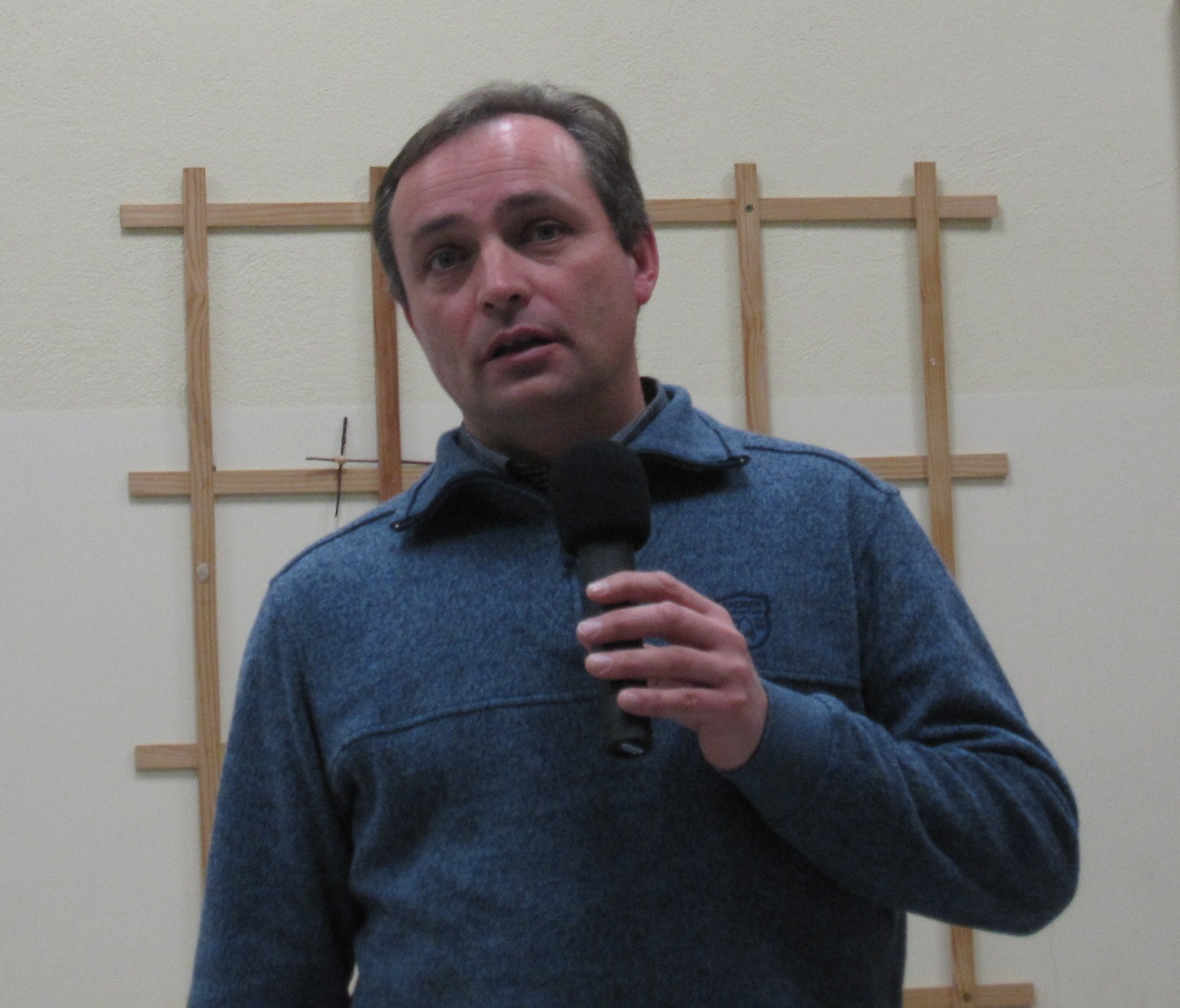 Branko Cestnik, Kodeljevo, januar 2012